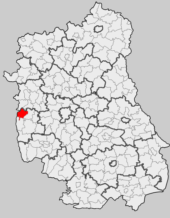 Map of gmina Wilków, Opole Lubelskie county, Lublin voivodship Mapa gminy Wilków, powiat opolski, województwo lubelskie